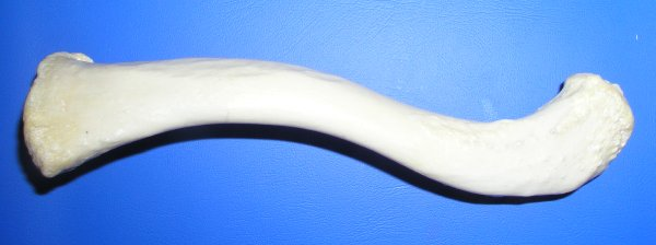 Clavicula superior aspect Right clavicula from above